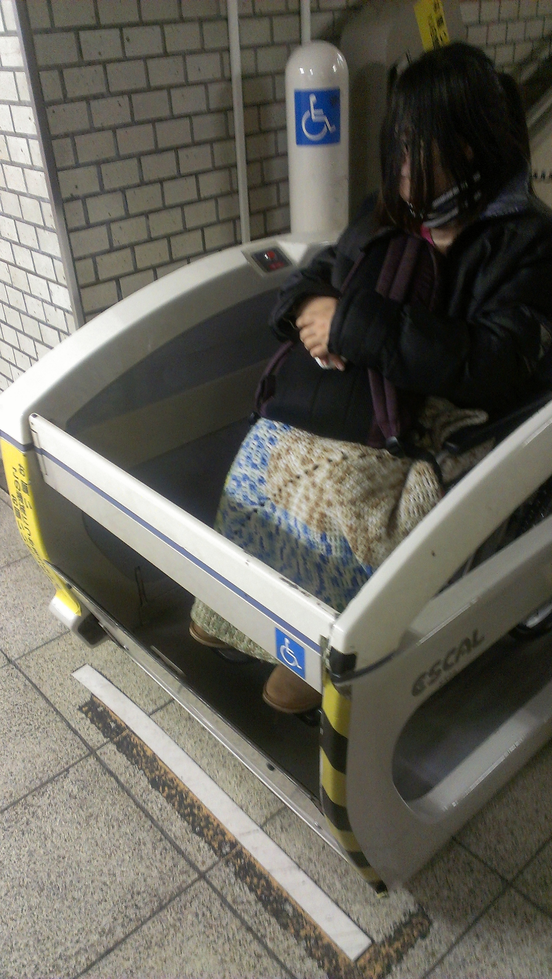 階段昇降機エスカル使用状態